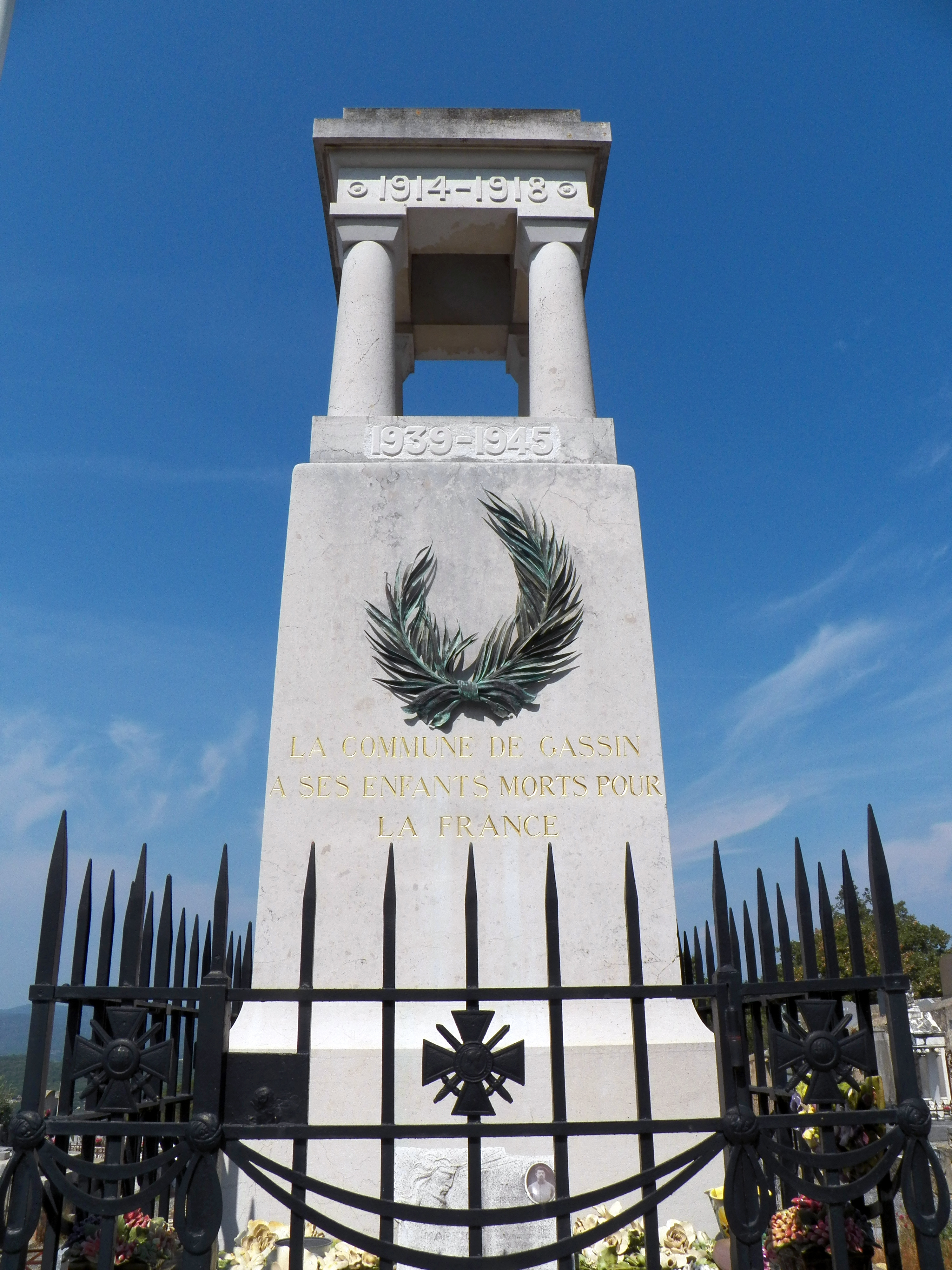 Monument aux morts de Gassin réalisé par Henri-Paul Nénot